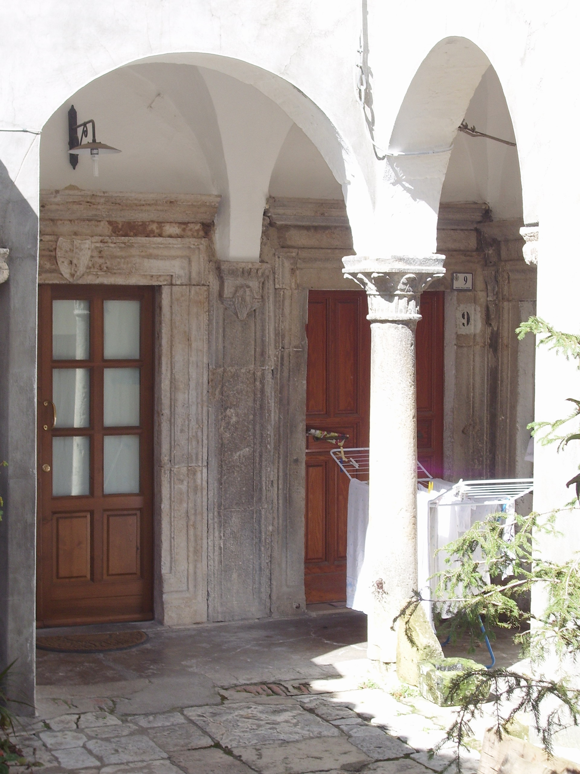 Il loggiato di Palazzo Orsini (Palazzo Comitale) a Sorano